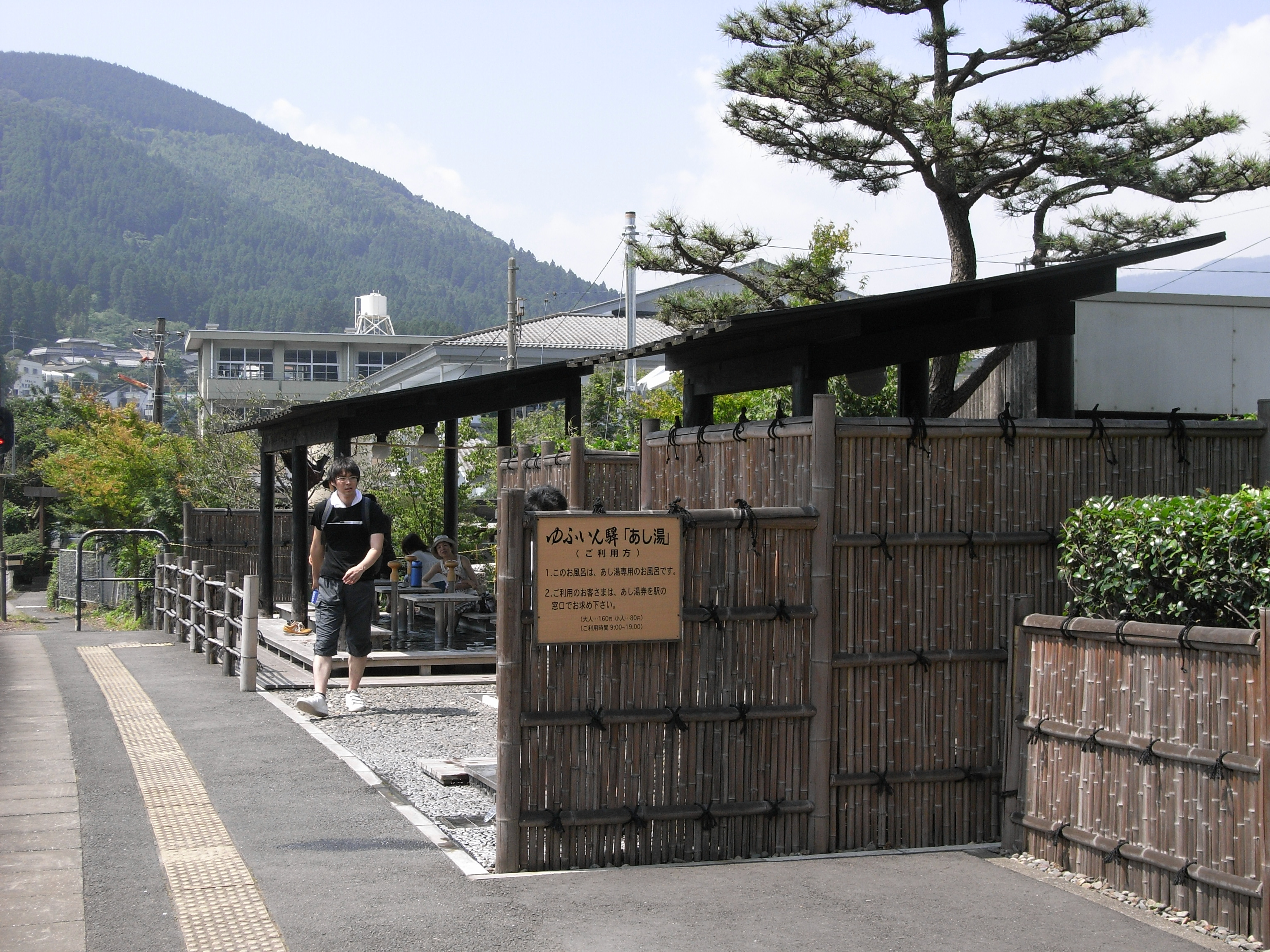 足湯（大分県由布市湯布院町川北8-2、由布院駅構内。由布院温泉）